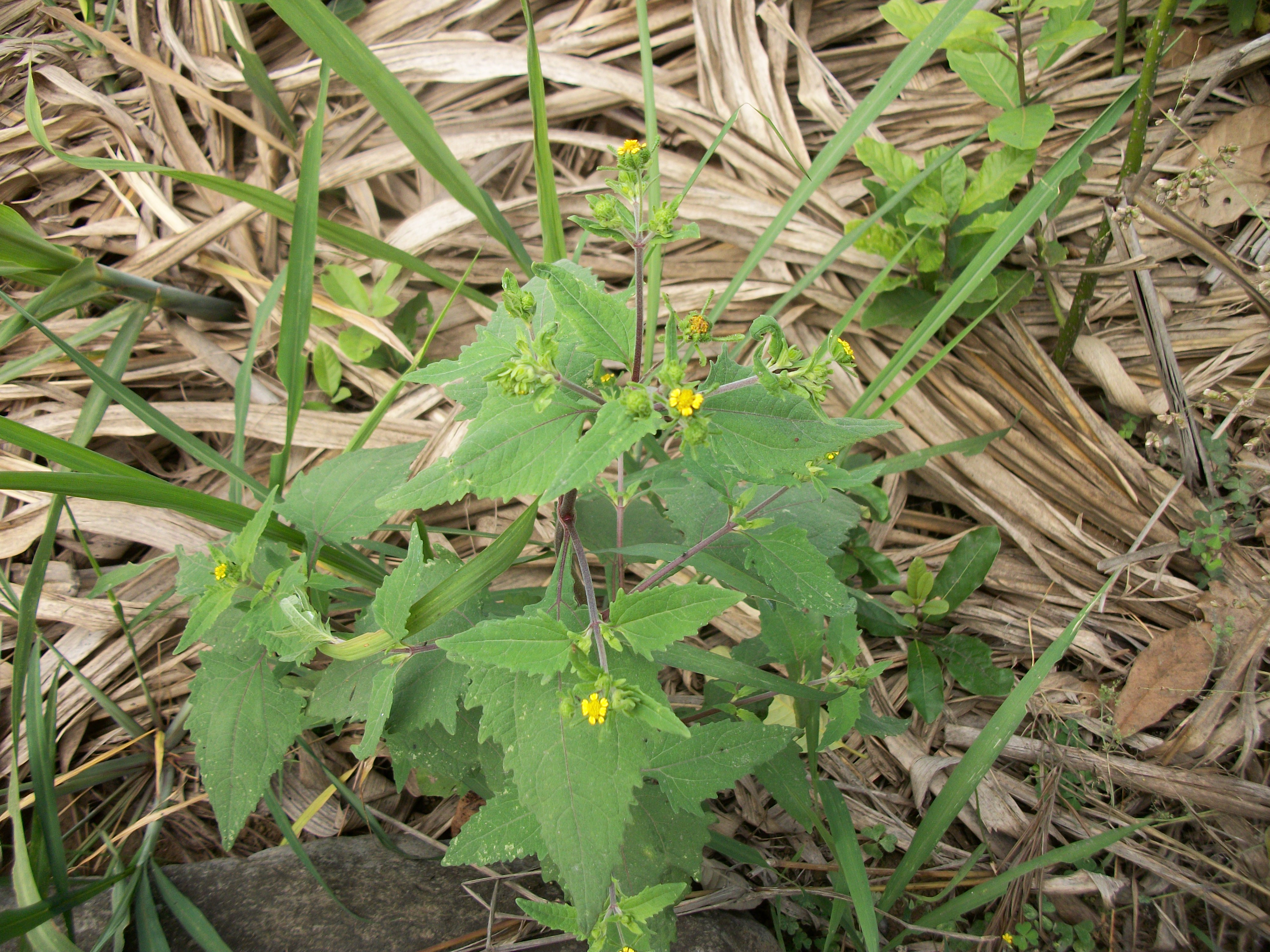 La plante